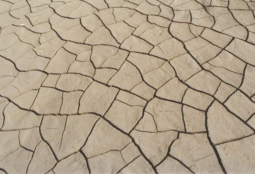 Ausgetrockneter See im Altai-Gebirge, Russland